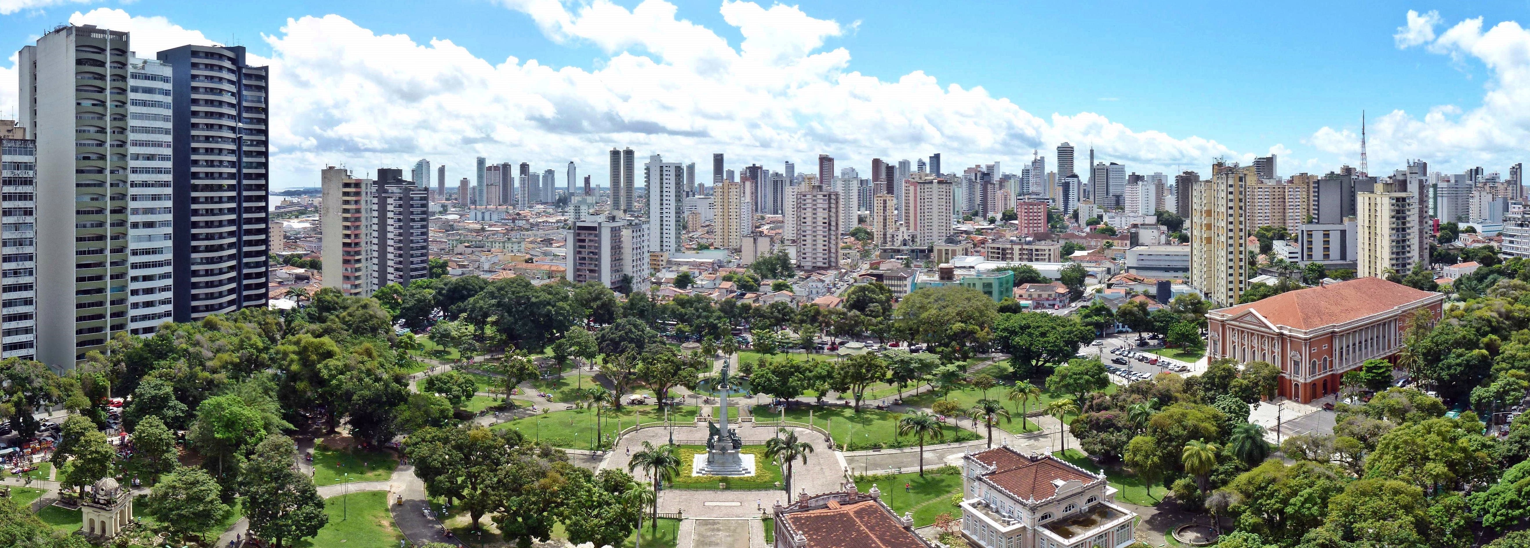 Parc de la République, Belém, Pará, Brésil.